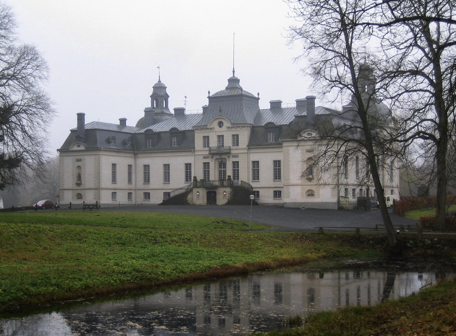 Kronovall castle, Scania.